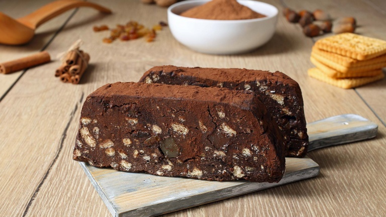 ciao vfr